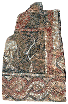 Делови од поден мозаик, базилика Св. Илија, с.Делогожди